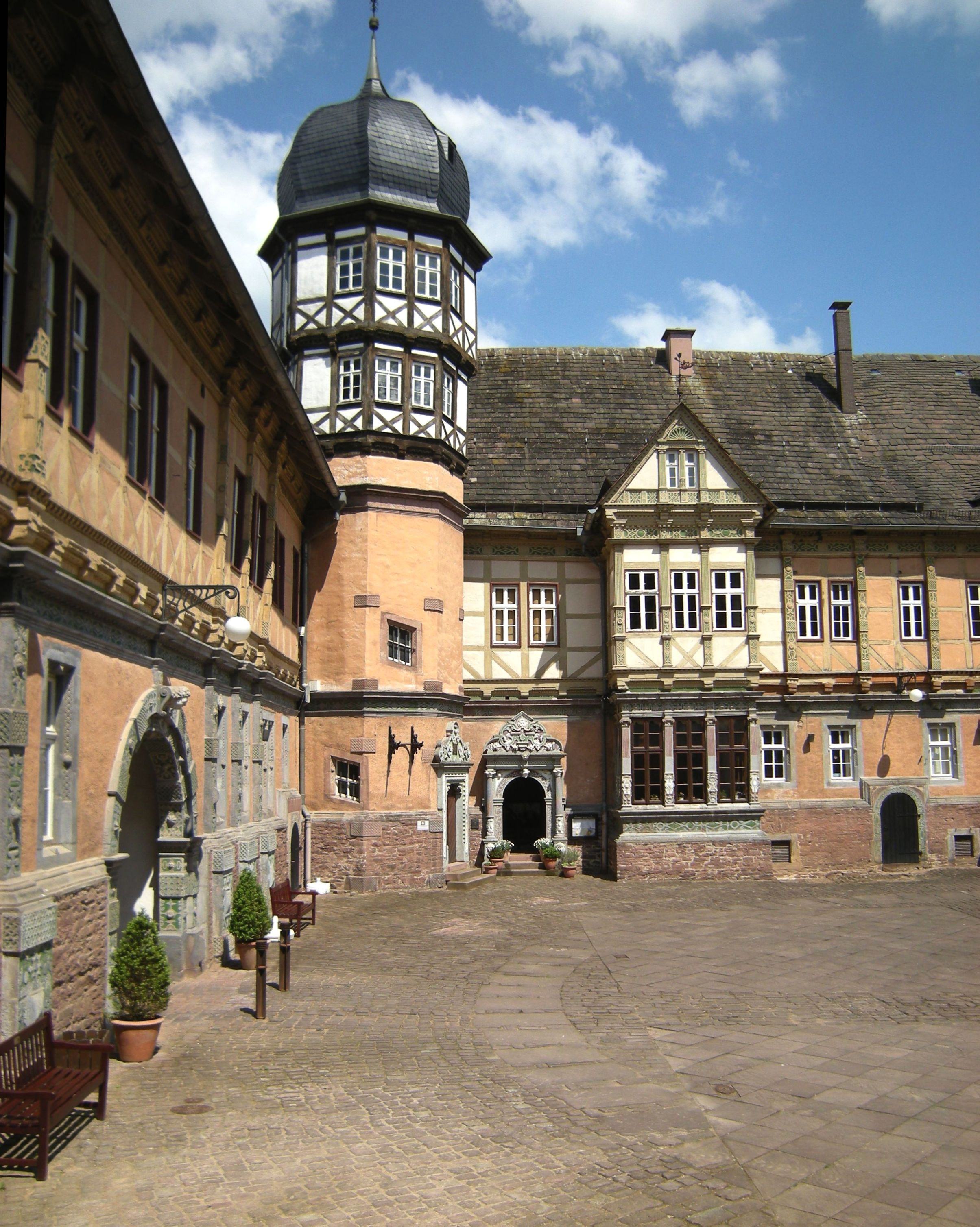 Bevern-Schlossturm mit Innenhof.jpg